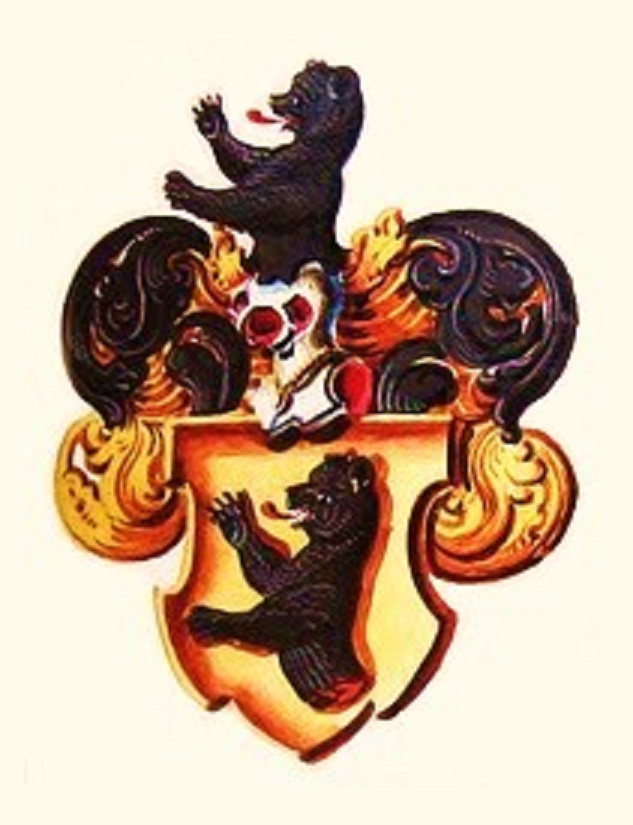 Wappen der Berner Patrizierfamilie Berseth († 1821).